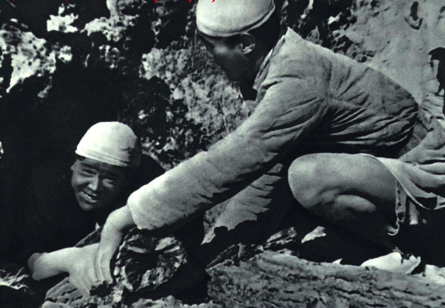 1967-05 张思德左